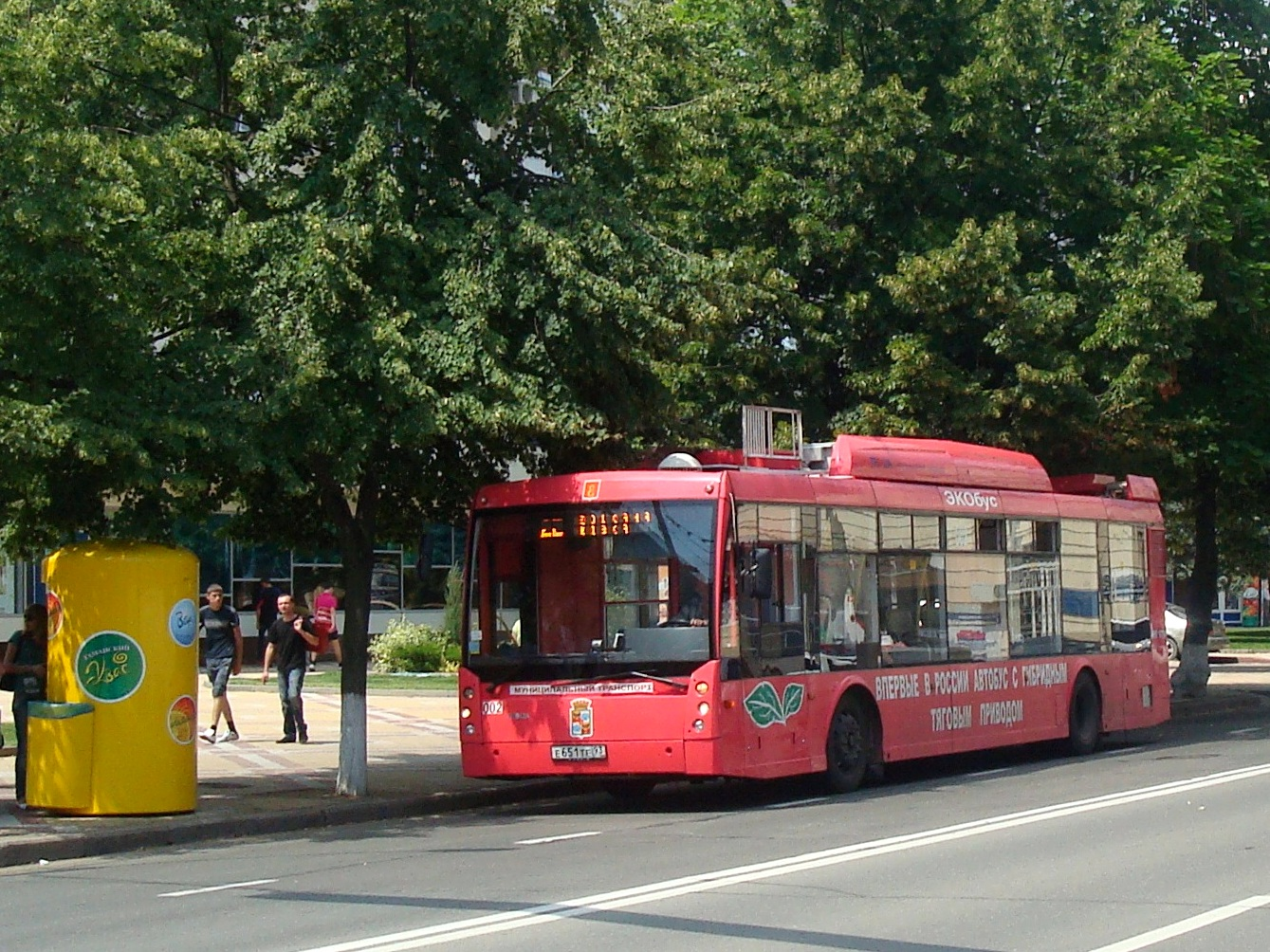 ЭКОбус в Краснодаре